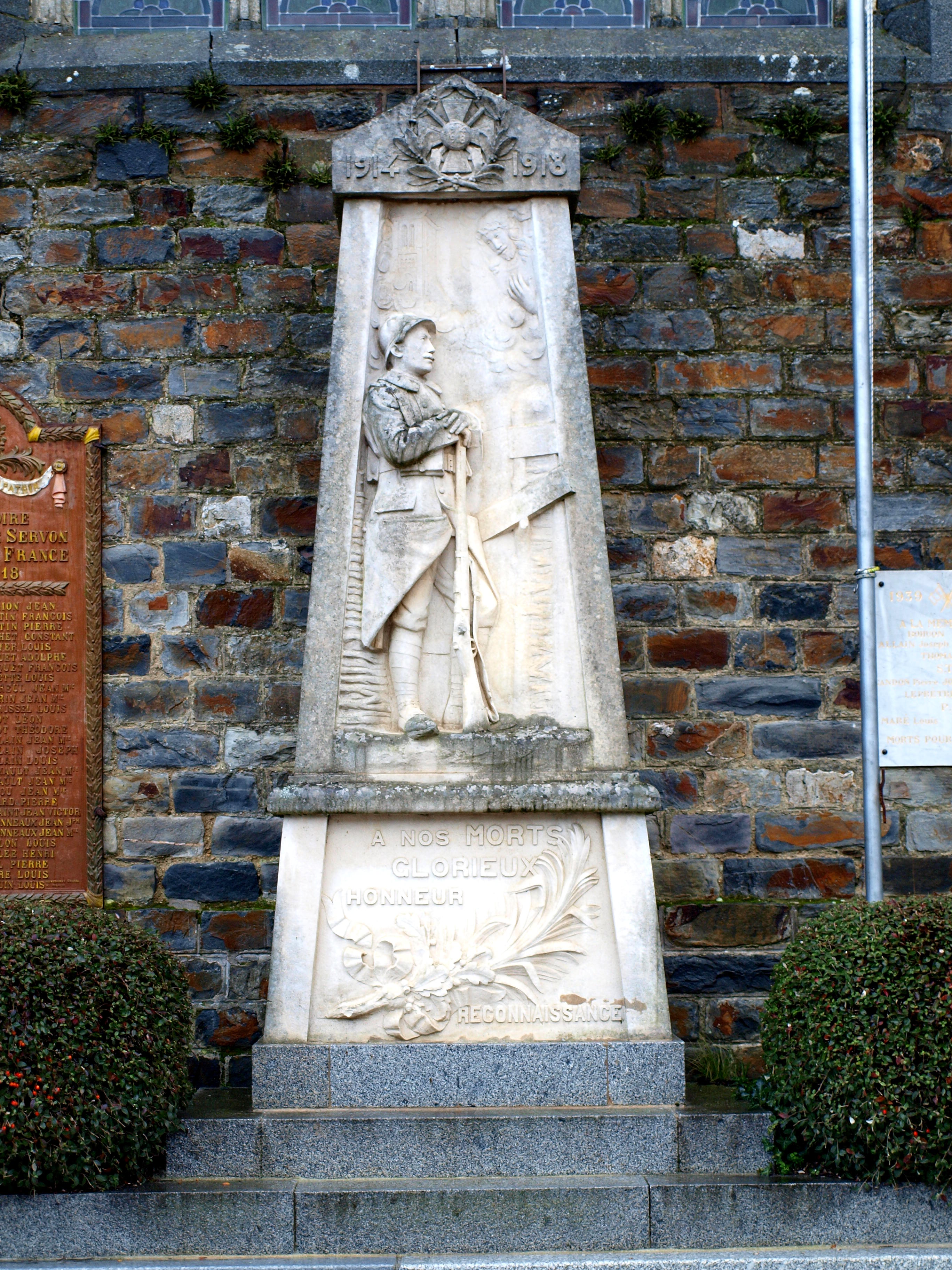 Servon-sur-Vilaine (Ille-et-Vilaine, France), monument aux morts